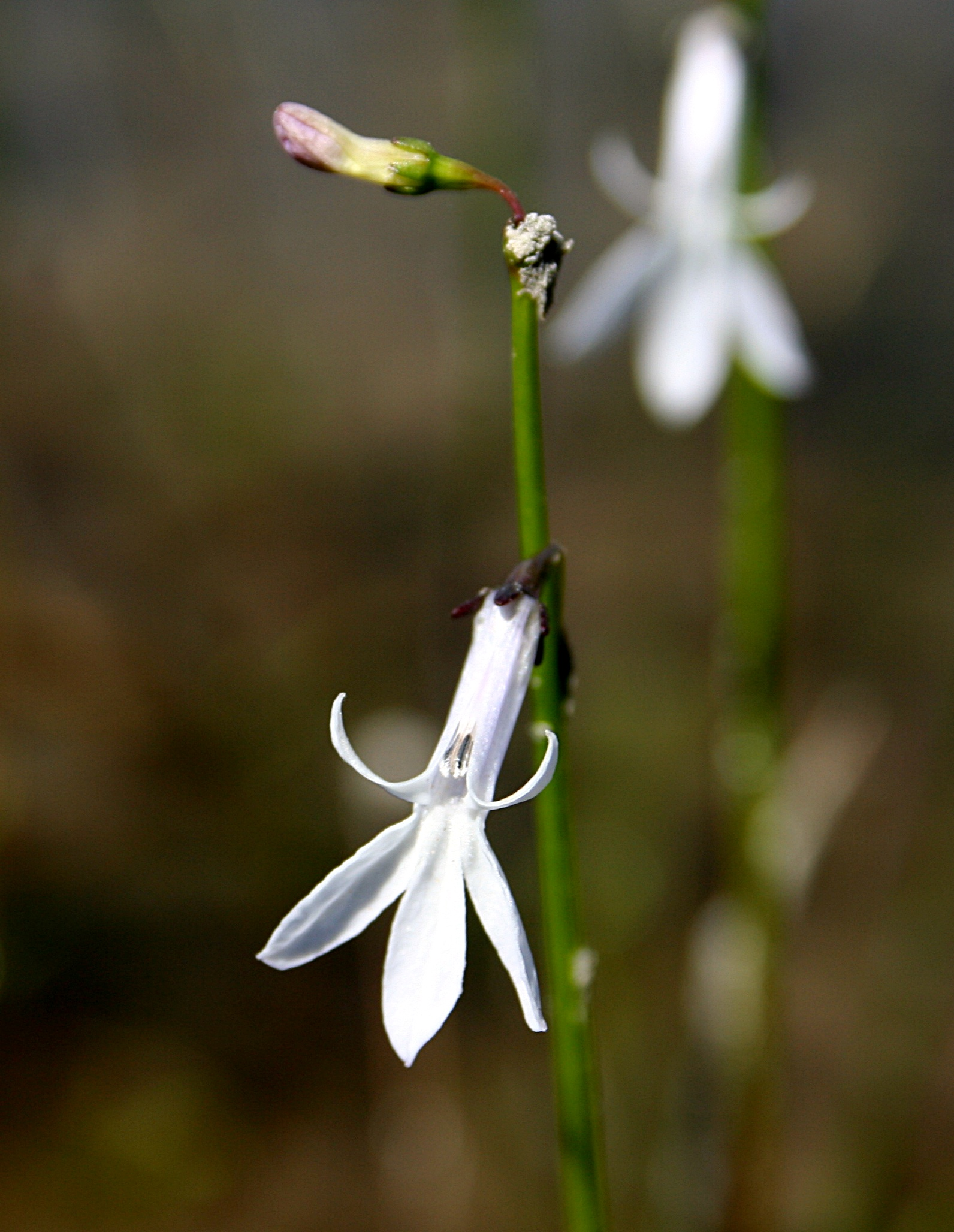 Park Narodowy Bory Tucholskie, kwiat i pąk lobelii jeziornej